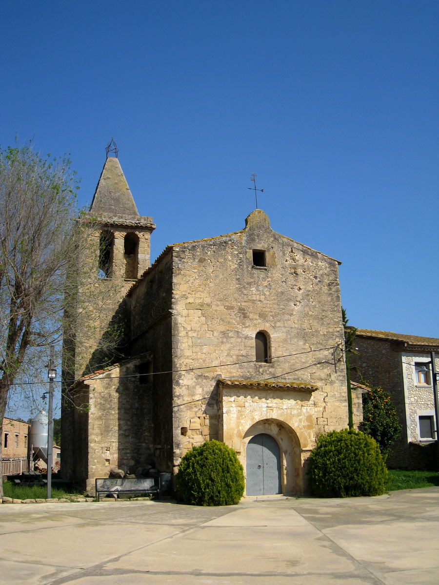 Església de Sant Martí de Llampaies (Alt Empordà-Catalunya). s.XII